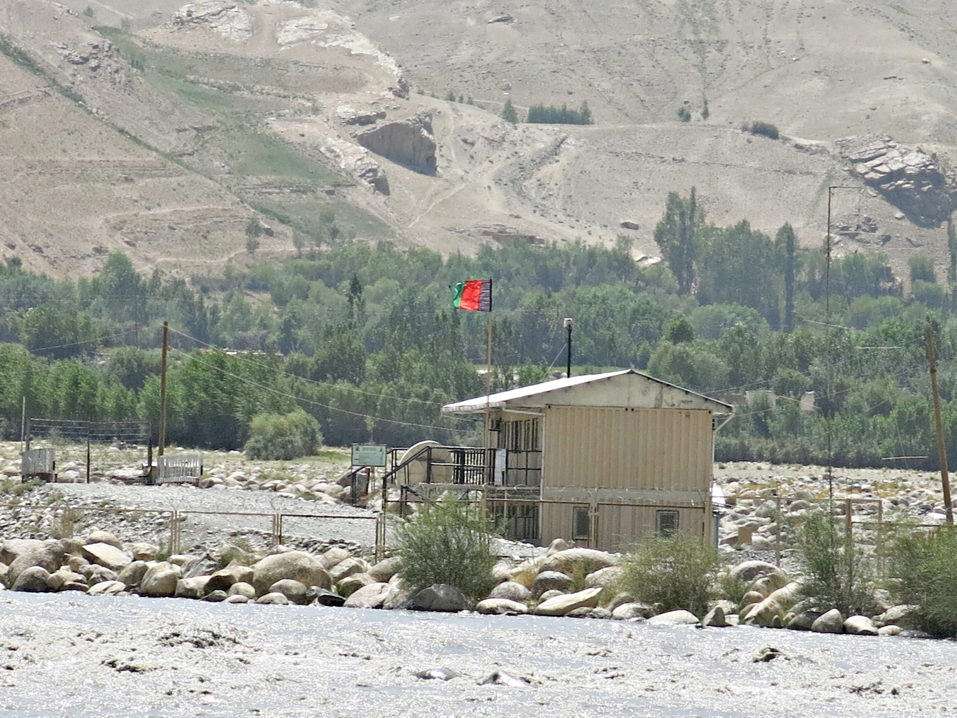 Blick auf den afghanischen Grenzstreifen am Westufer des Pjantsch-Flusses